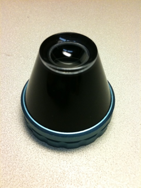 Dreispiegelkontaktglas, Ansicht von hinten